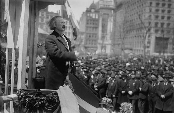 Igacy Paderewski speaking to crowds.